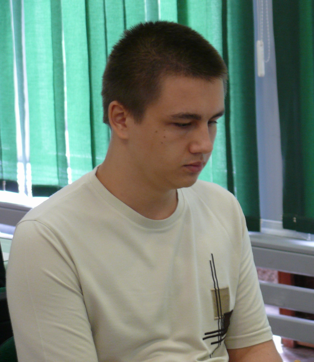 GM Yuriy Kuzubov, Ukraine, Polanica-Zdrój 2008